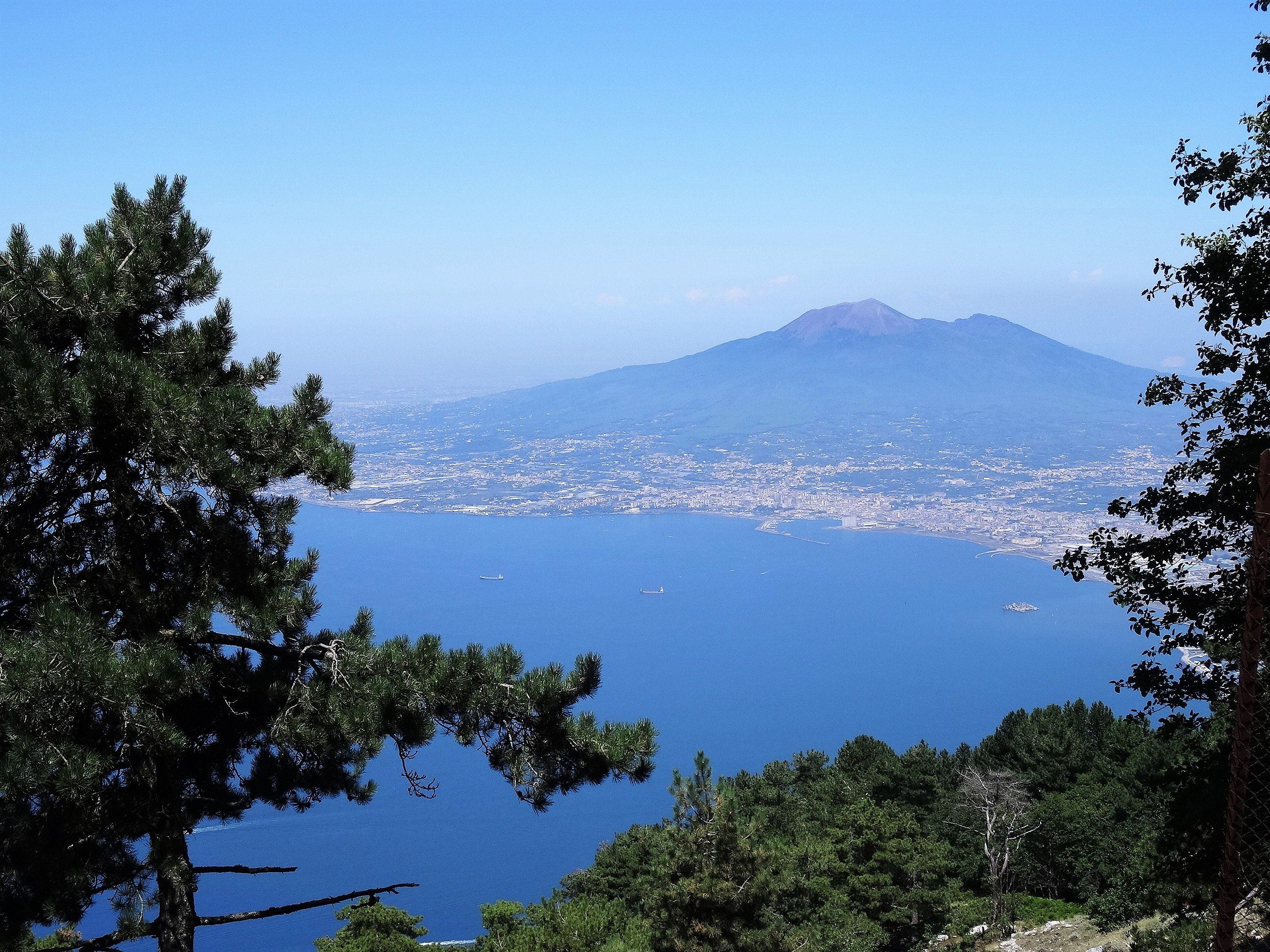 Blick vom Monte Faito auf den Golf von Neapel und den Vesuv.